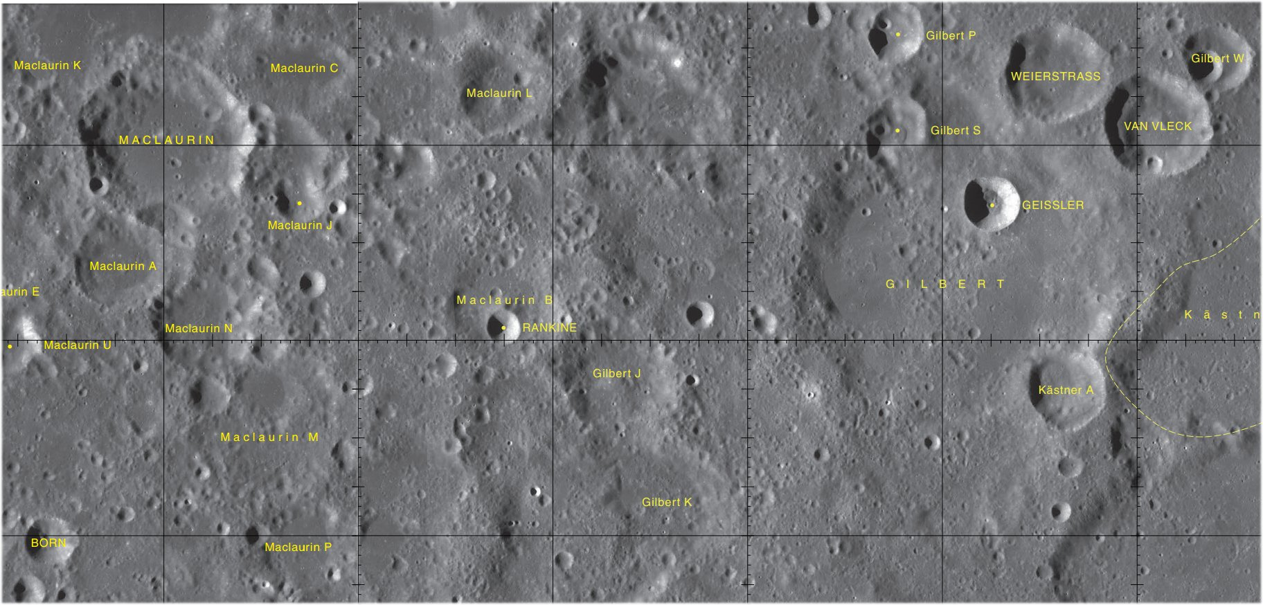 Cráter lunar Rankine. Localización. (Imagen LRO)